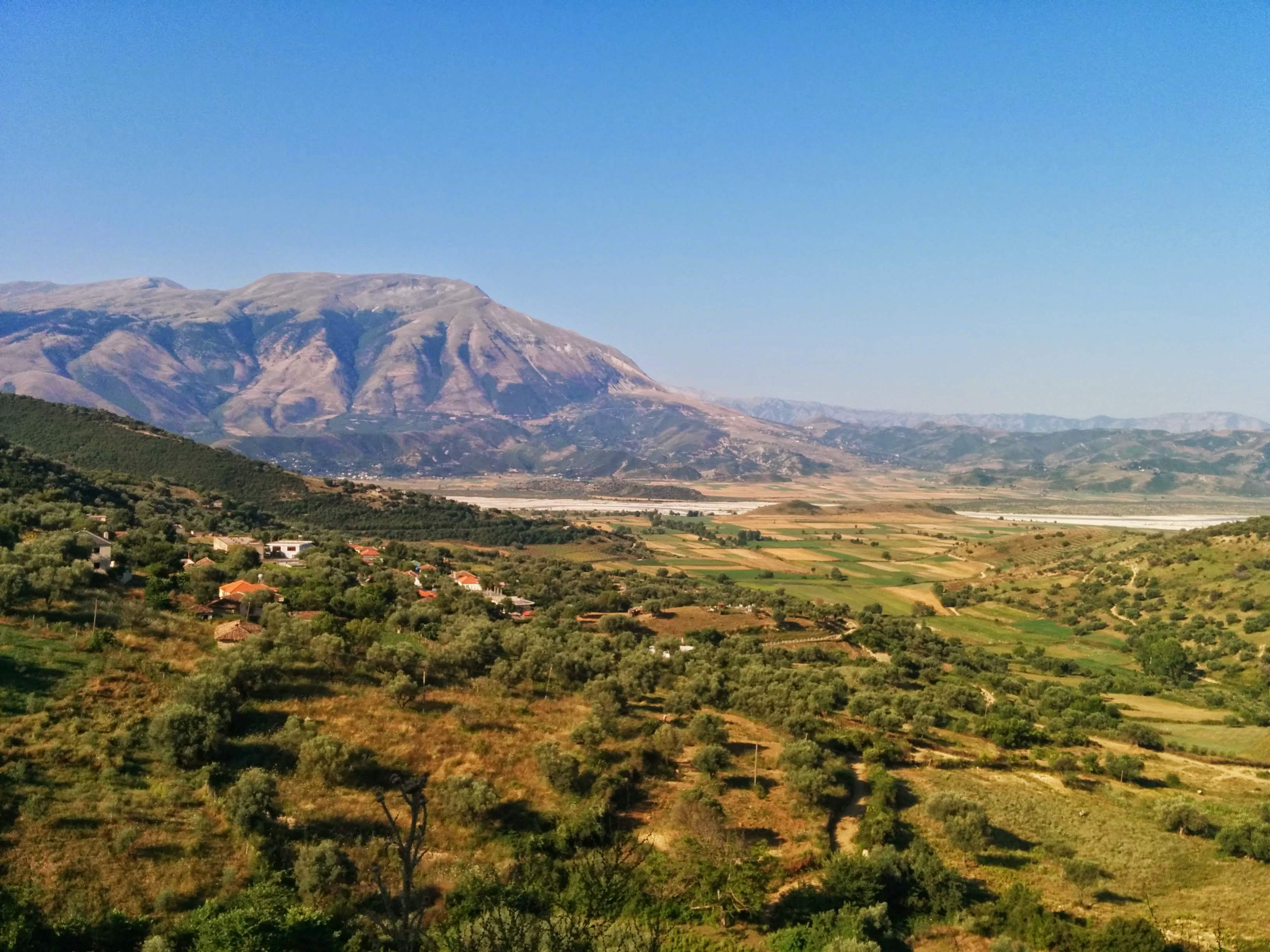 Pamje e marrë nga lagjja Hederaj